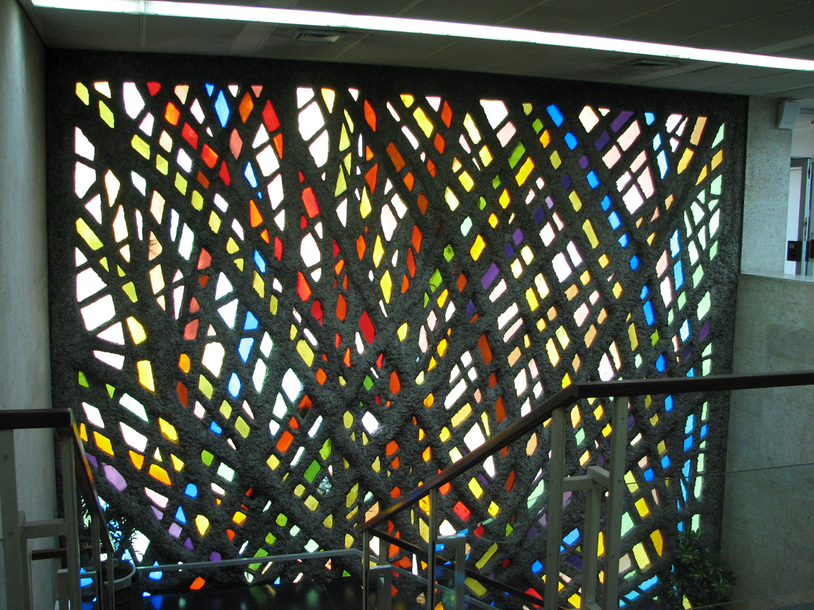 Dagon Museum, Downtown, Haifa, Israel The Museum is dedicated to the history of grain products מוזיאון דגון בעיר התחתית בחיפה שוכן במבנה המשרדים של ממגורות דגון. המוזיאון מוקדש לתולדות הדגן ומוצריו, וכלל ממצאים ארכאולוגים הקשורים בנושא וכן דגמים של מתקנים שונים בהם משתמשים בממגורות דגון חלון ויטראז' בכניסה למוזיאון במעלה לקומת המשרדים